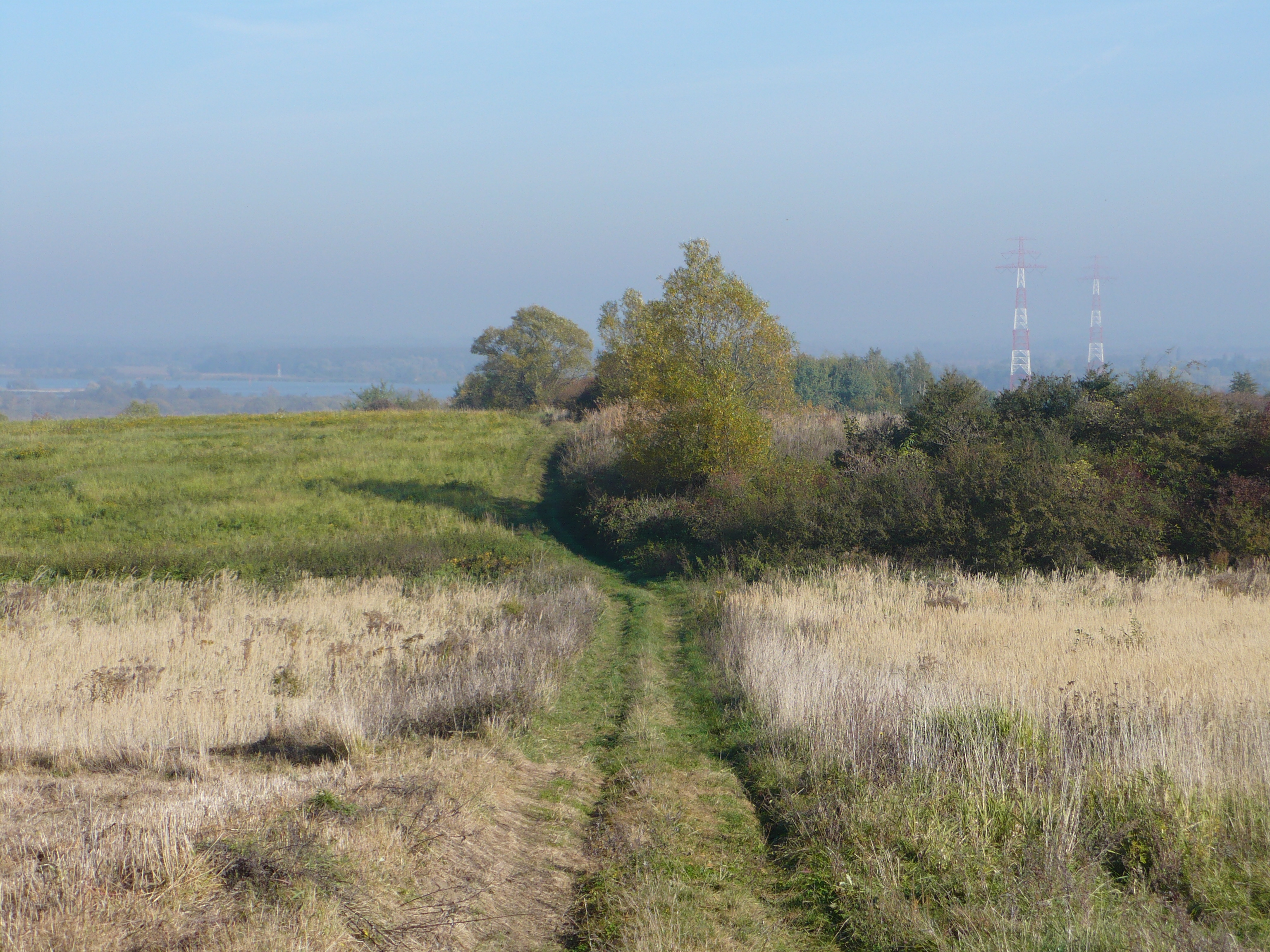 Wzgórza Warszewskie - Płaskowzgórze Przęsocińskie (Szczecin)